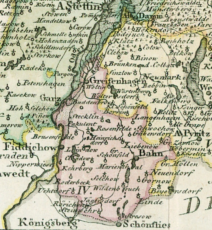 Ausschnitt aus "Landkarte des Herzogtums Vor- und Hinterpommern aus dem Jahr 1794"